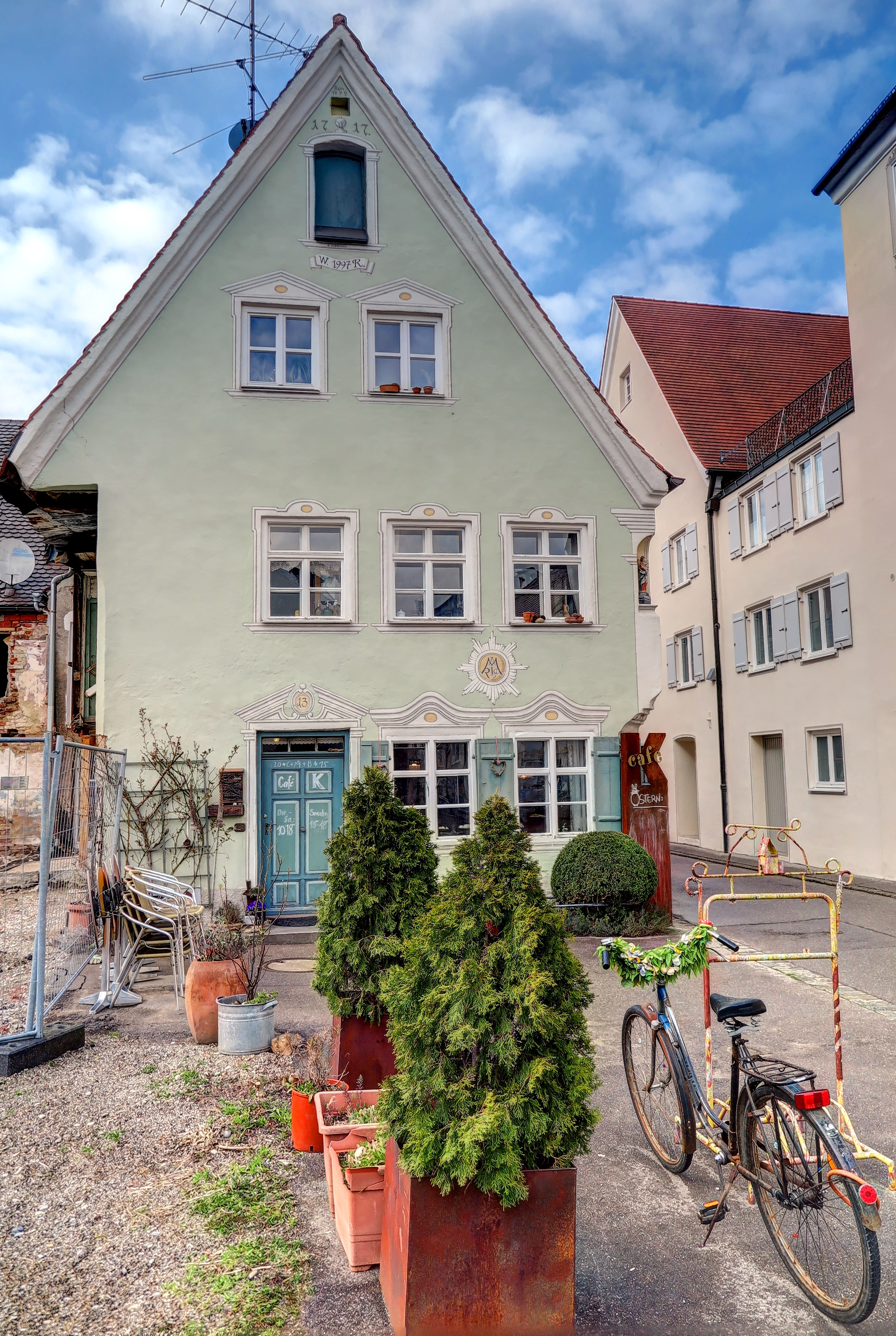 Deutschland, Bayern, Schwaben, Landkreis Unterallgäu, Mindelheim, Altstadt-Cafe